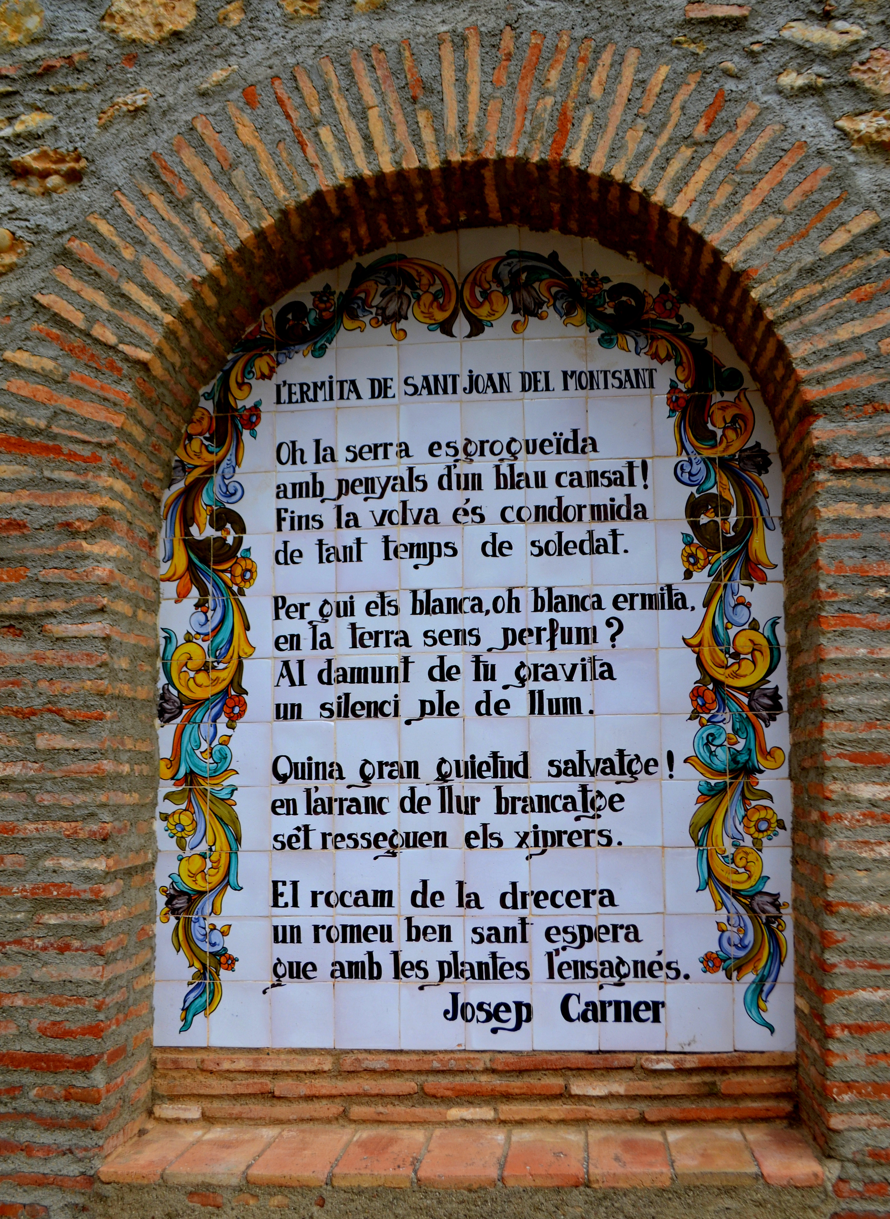 Ermita de Sant Joan del Codolar (Cornudella de Montsant)